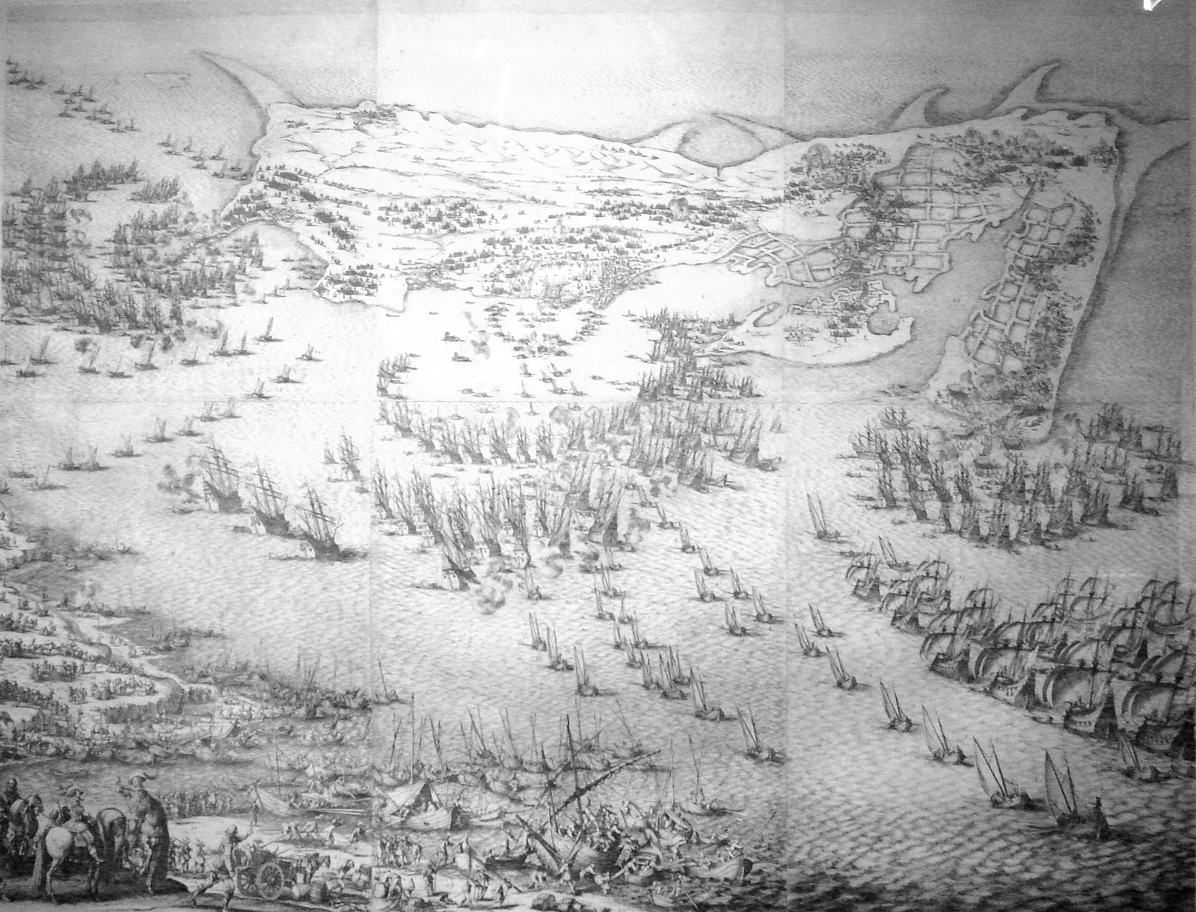 Capture Ile De Re, 16 Sept 1625